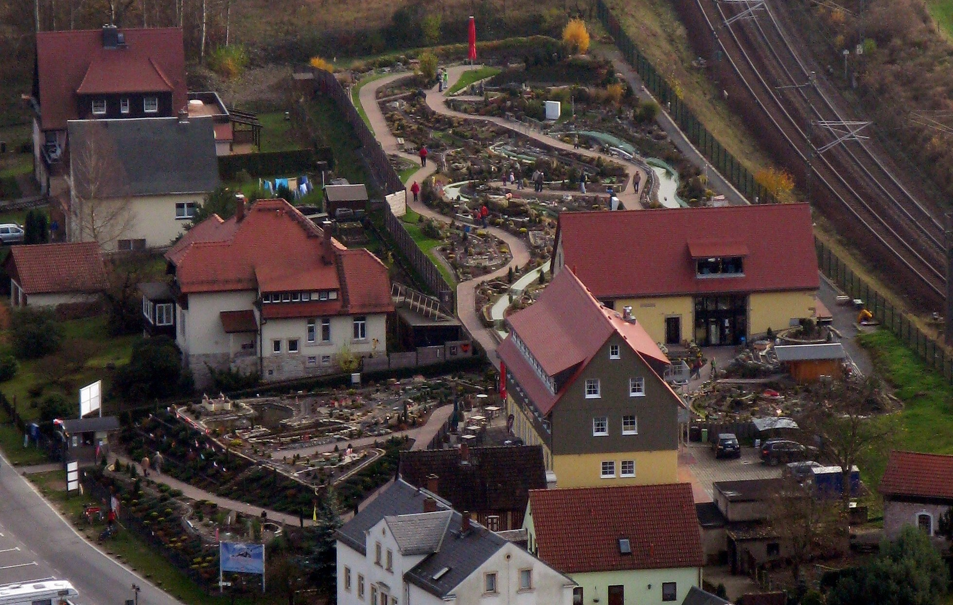 Eisenbahnwelten im Kurort Rathen: Überblick über die gesamte Anlage aufgenommen in der Nähe der Bastei